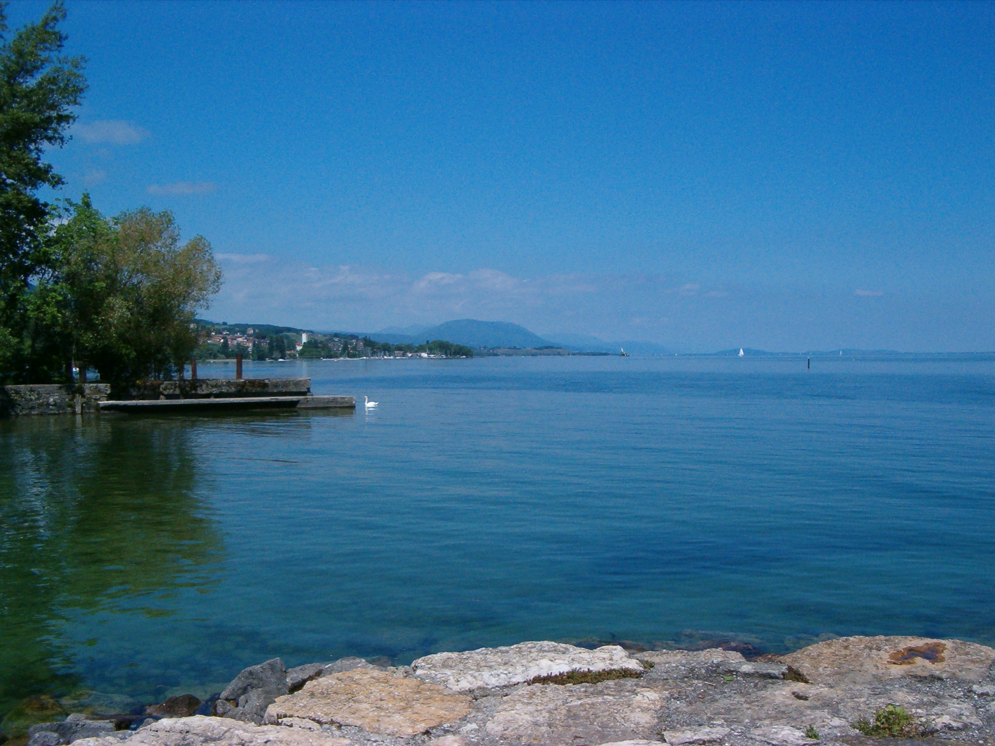 Vue du lac de Neuchâtel depuis la rive nord, port de Vaumarcus